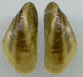 Foto do Mexilhão Dourado adulto